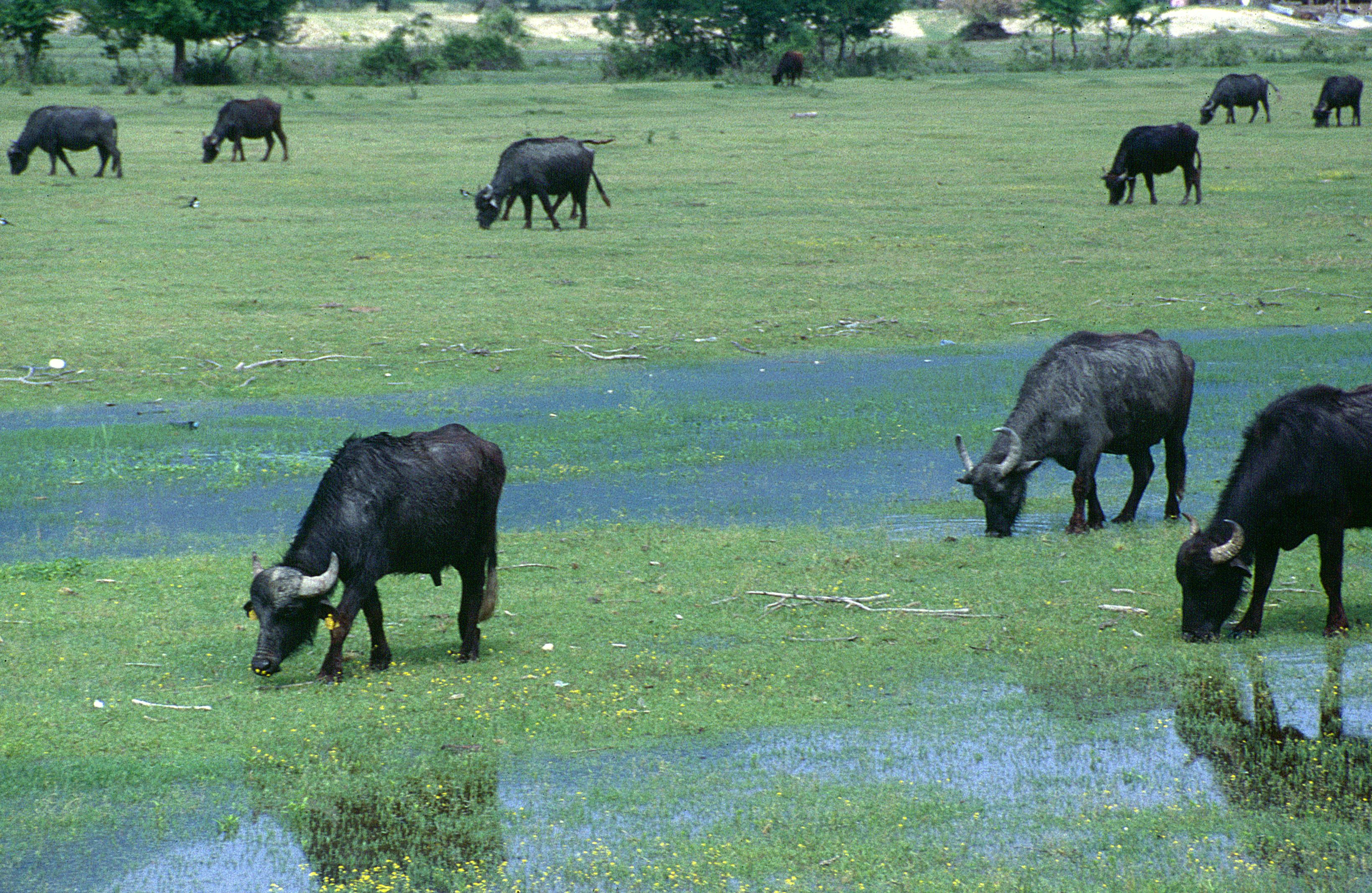 Wasserbüffel am Kerkini-See